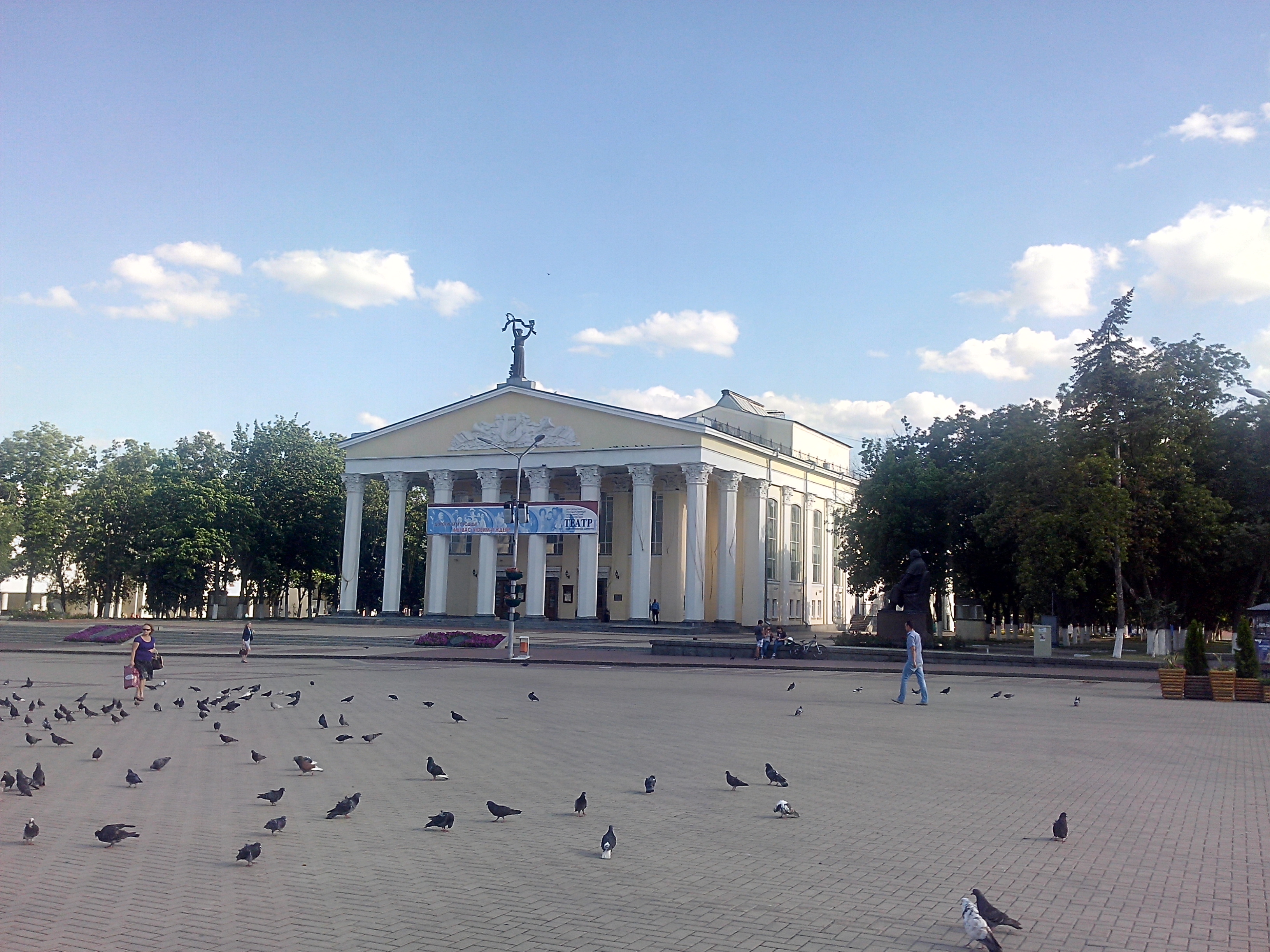 Белгородский государственный академический драматический театр имени М. С. Щепкина